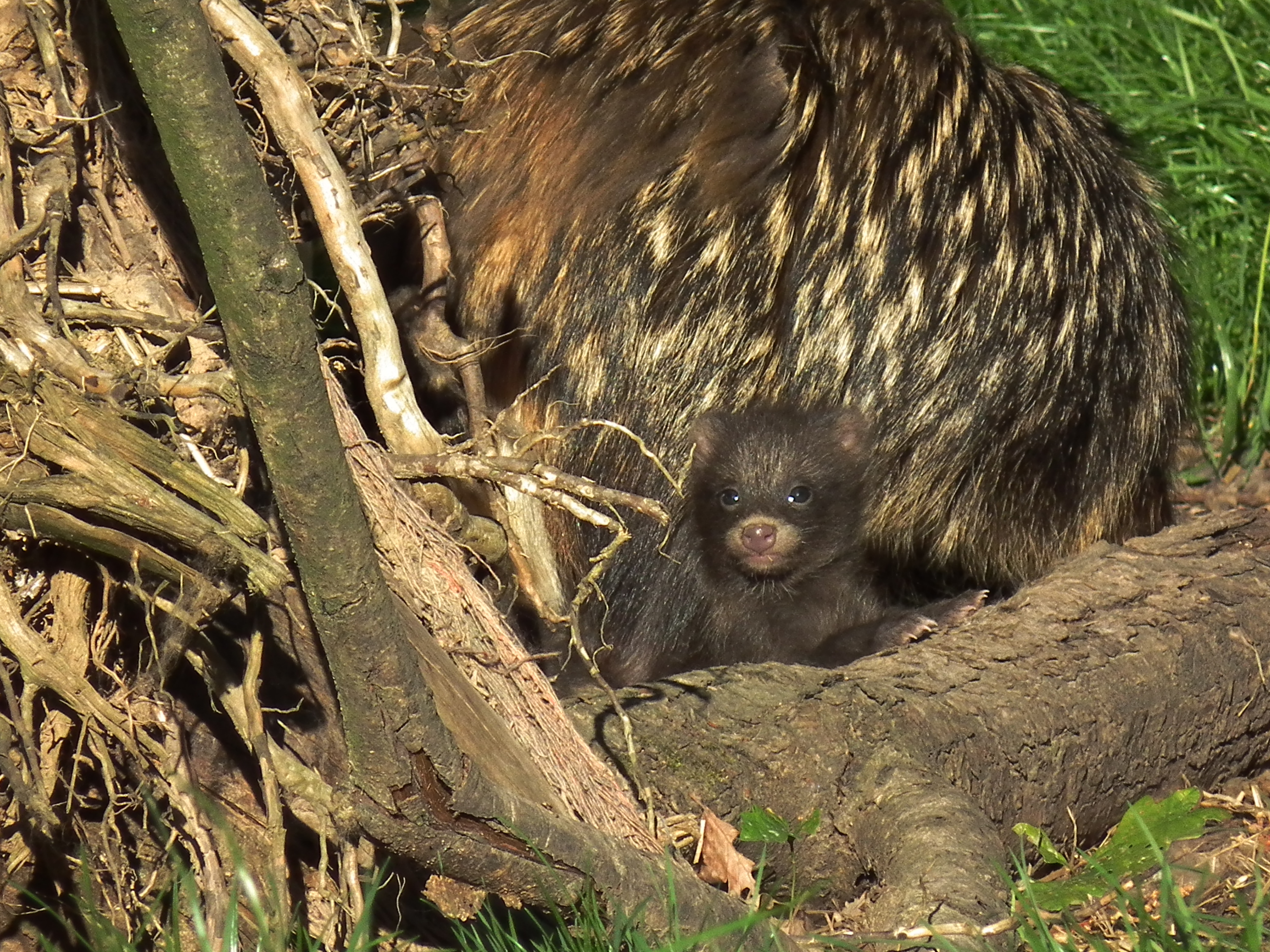 Marderhund (Nyctereutes procyonoides) im Wildpark Pforzheim (Baden-Württemberg, Deutschland)